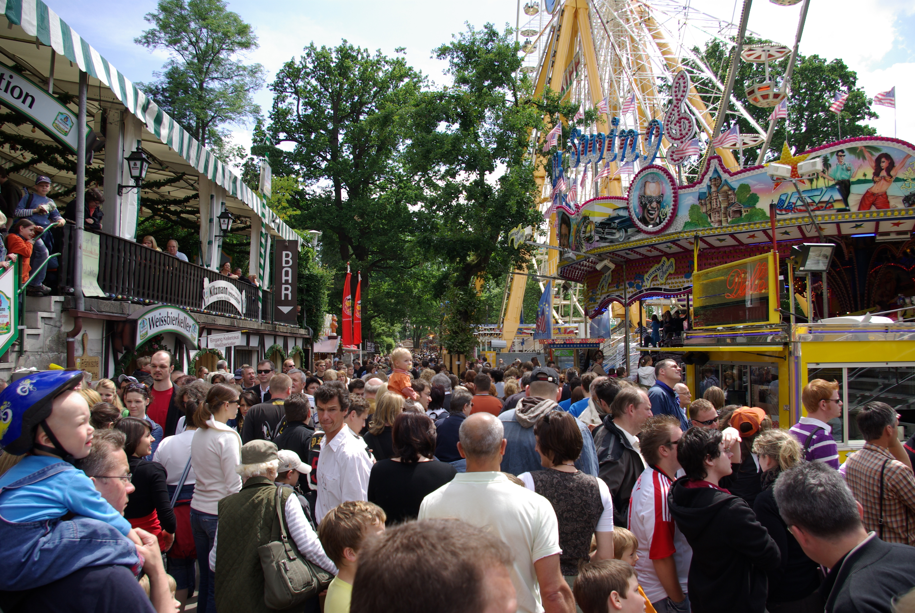 Der Weißbierkeller (links) und Fahrgeschäfte auf der Erlanger Bergkirchweih 2009